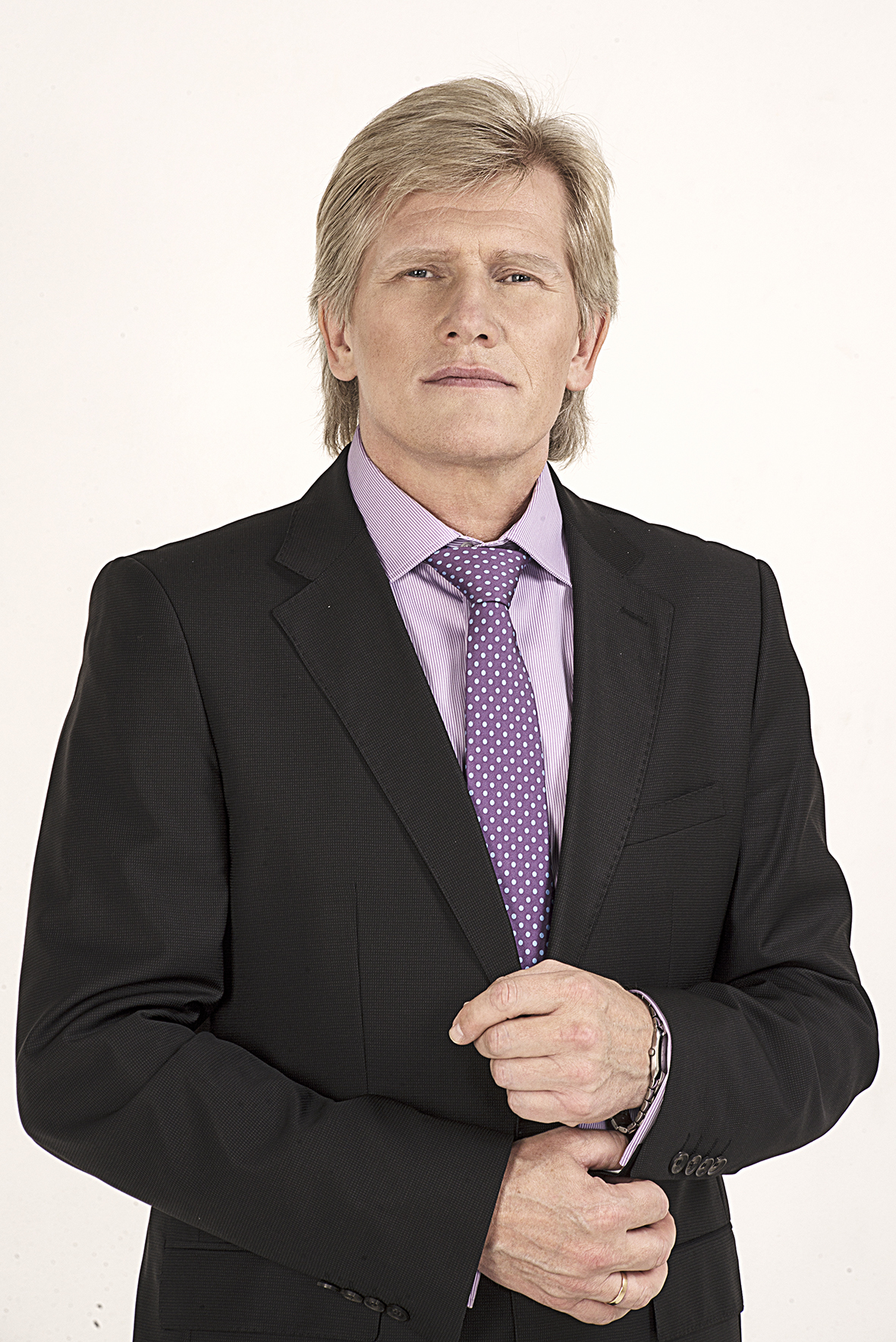 Васильев Дмитрий Владимирович (биатлонист)